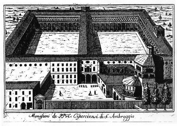 Incisione settecentesca di Marc' Antonio Dal Re